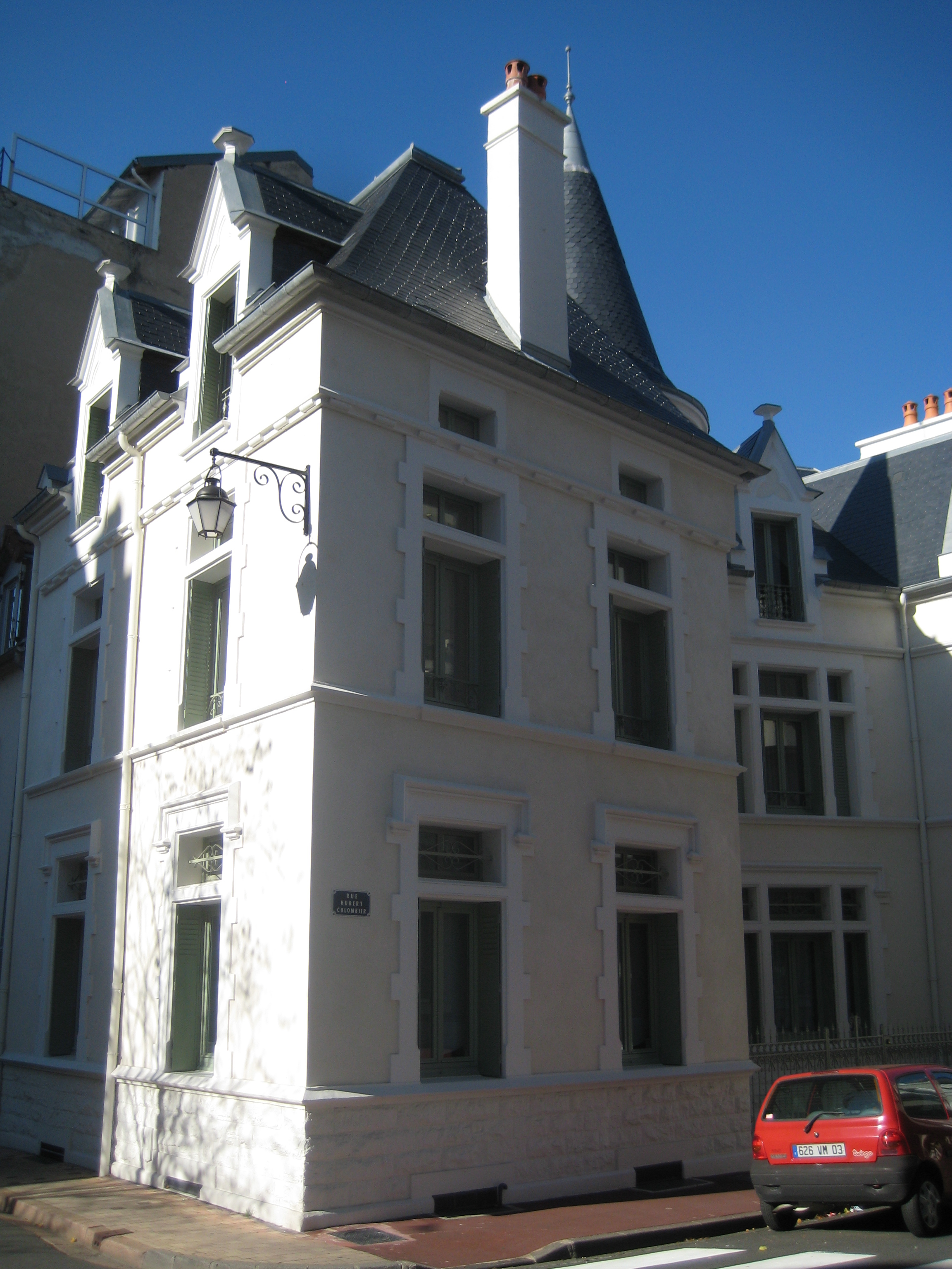 Castel Français, 1 rue Hubert Colombier à Vichy